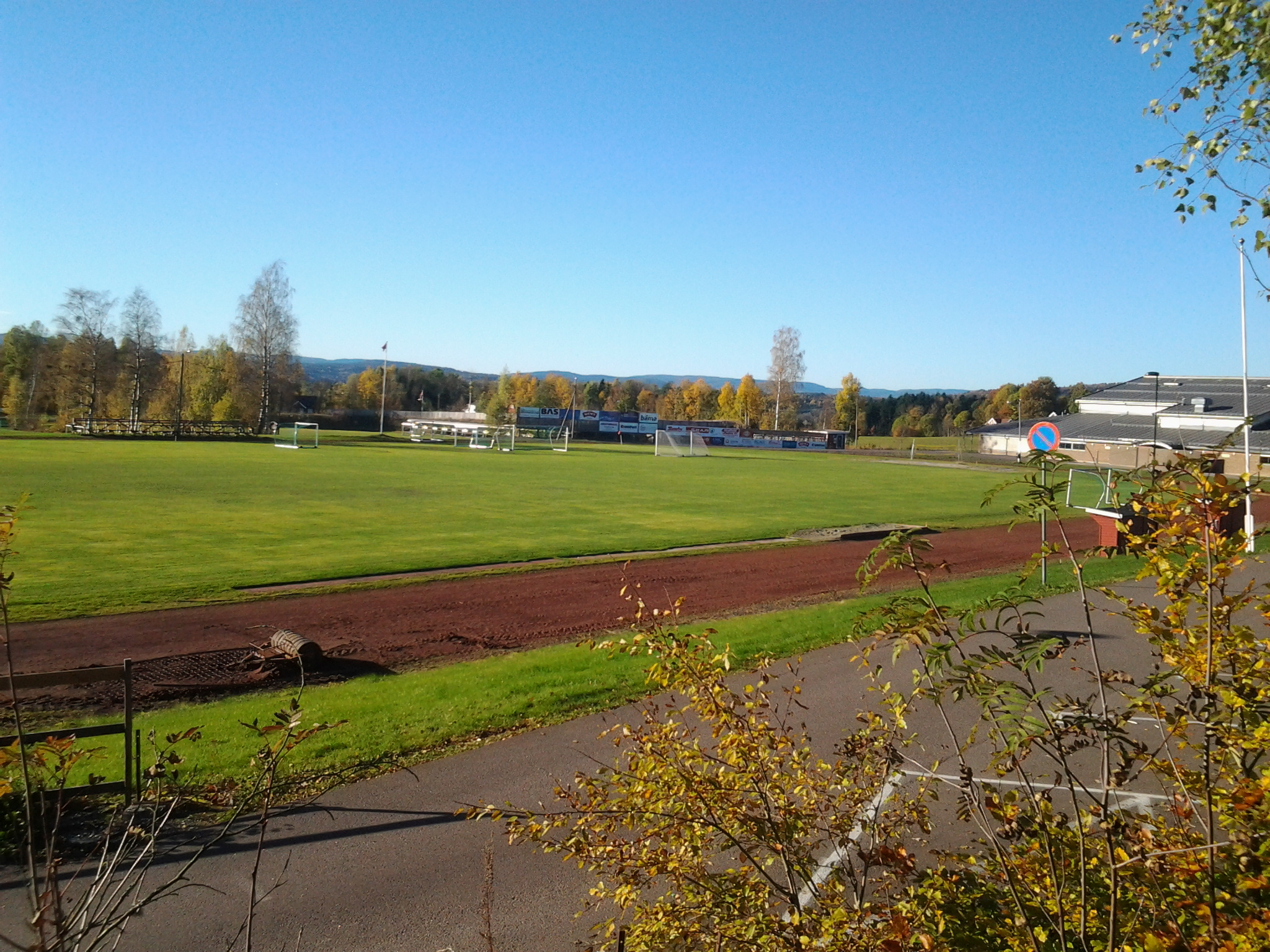 Bibomyra fotballbane med løpebane og klubbhus i bakgrunn.